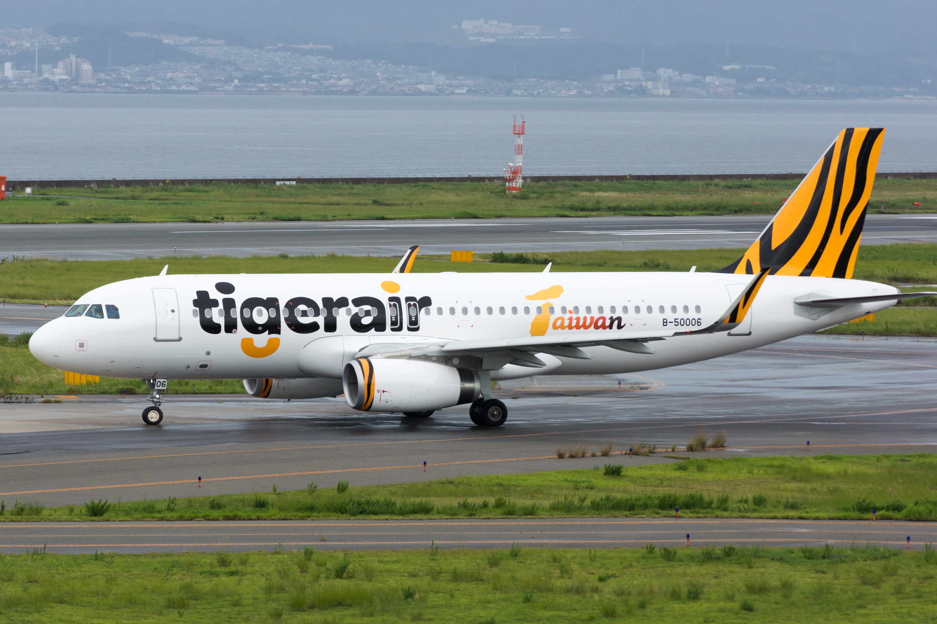 Tigerair Taiwan / 臺灣虎航 / タイガーエア台湾 Airbus A320-232 B50006 IT285, Departed to Kaohsiung Osaka Kansai Int'l Airport